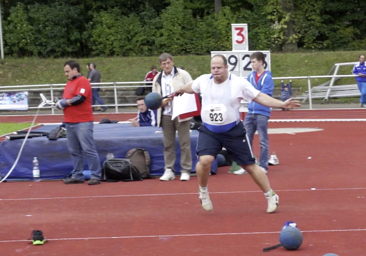 Drehtechnik Schleuderball. Eindrehen in zweite Vorwärtsdrehen Martin Michael Schmidt von der TSG Bruchsal. Mehrfacher Badischer Meister in der Jugend und bei den Männern sowie Deutscher Meister in der Jugend mit 73,79m 1kg. In den Deustchen Ewigenbestenliste bei den Männern (1,5kg) steht er auf Platz 60.